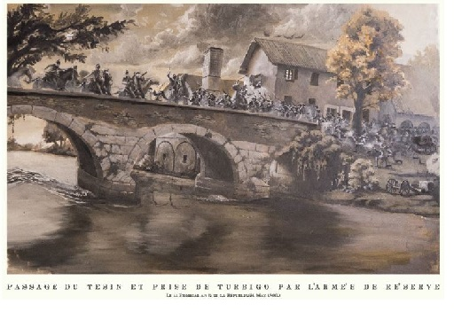 Quadro realizzato per il 220° anniversario della battaglia sul ponte del Naviglio a Turbigo del 31 Maggio 1800 tra le truppe Napoleoniche e gli austriaci.